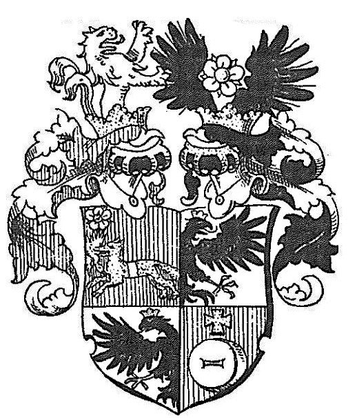 Herb Nowack